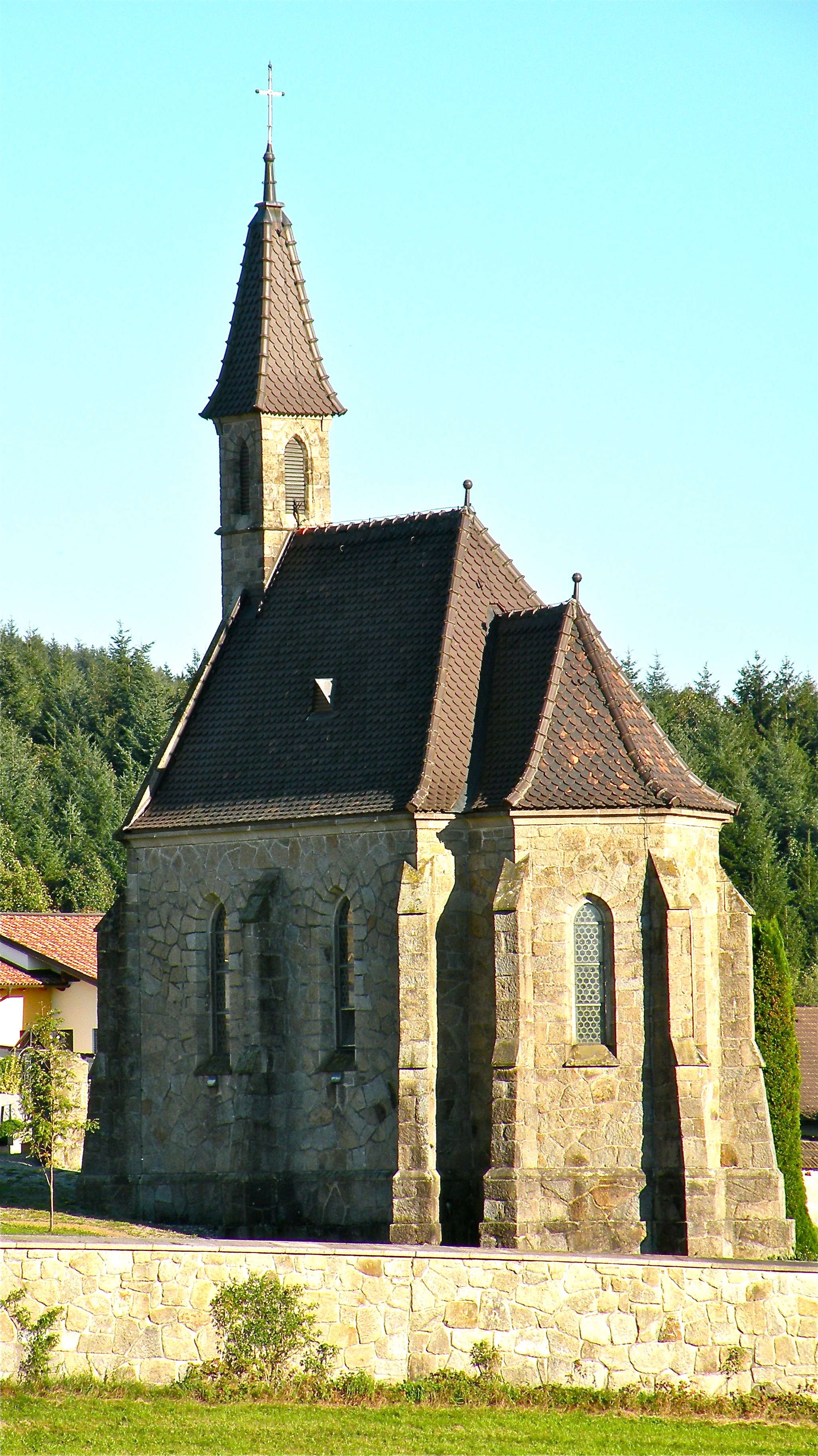 Kath. Filialkirche Heiliges Kreuz auf dem Friedhof in Münzbach im Bezirk Perg in Ob erösterreich